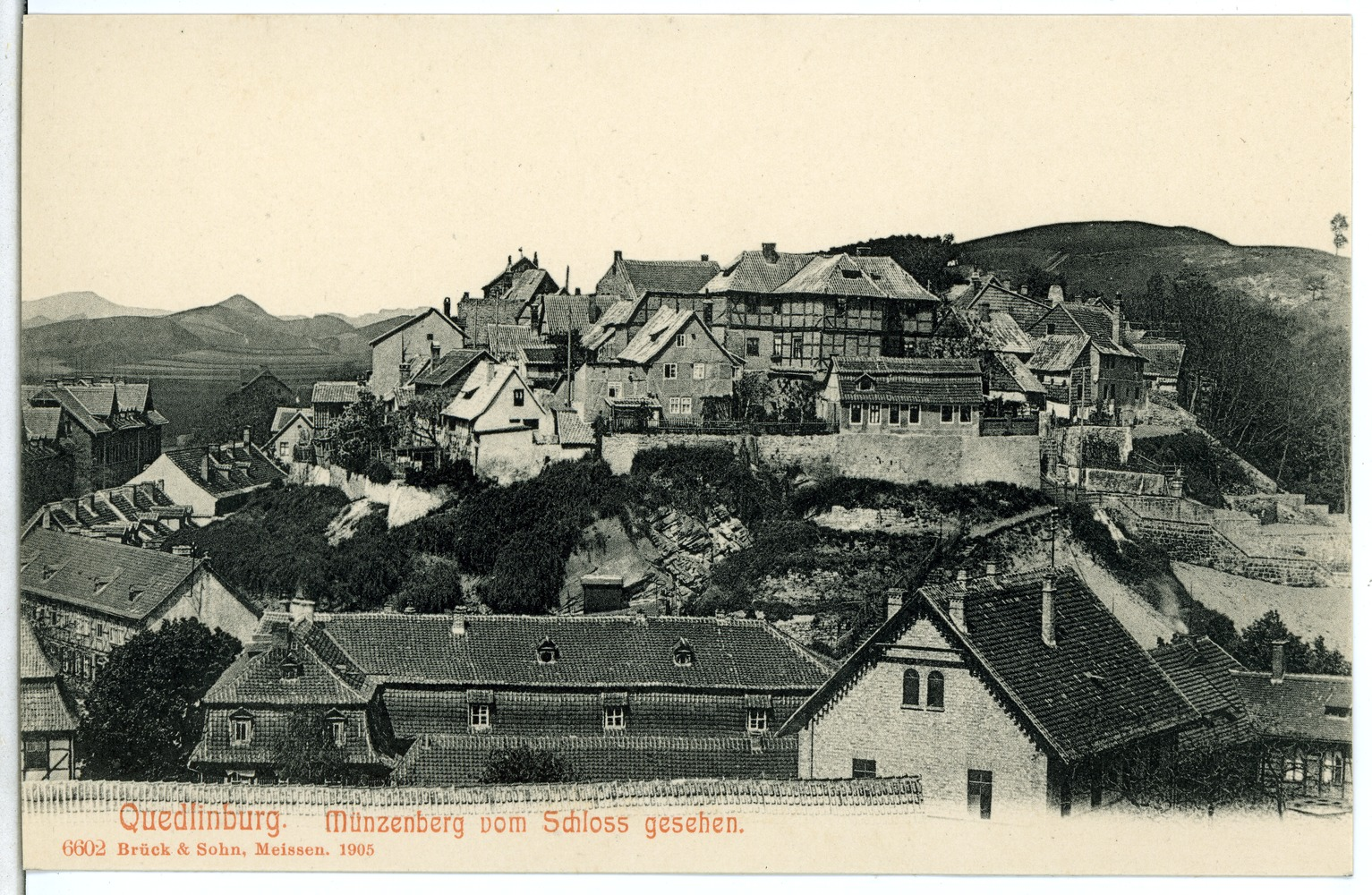 Quedlinburg; Münzenberg vom Schloß gesehen This postcard is from publisher Brück & Sohn in Meißen ( This postcard has a unique number 06602 and is available in a higher resolution at the publisher. This images was uploaded in a cooperation project between Wikipedians and the publisher.